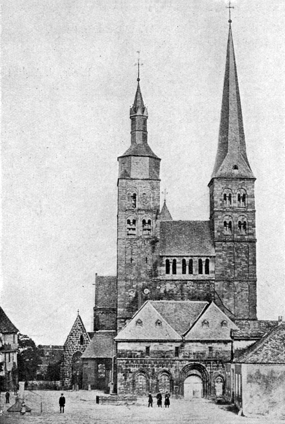 Westseite des Fritzlarer Doms (Stiftskirche St. Petri) vor dem Umbau der Türme.